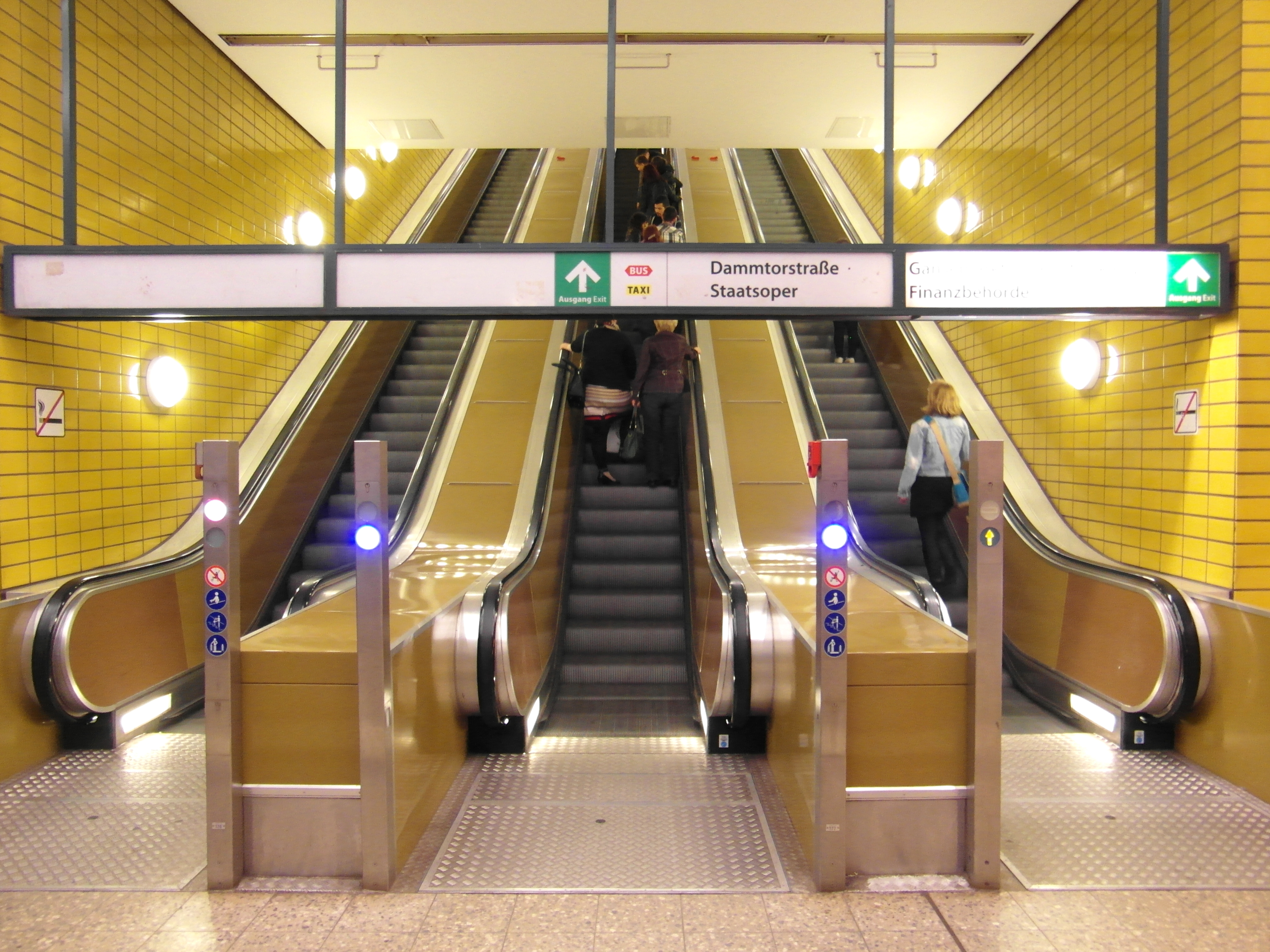 U-Bahnhof Gänsemarkt in Hamburg - Linie U2